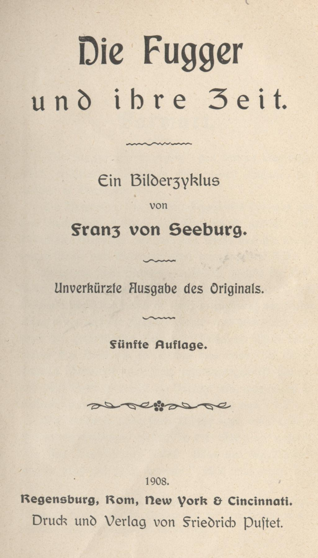 Franz von Seeburg, Priesterschriftsteller, München, Die Fugger